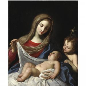 Angelo Massarotti Madonna col bambino e san Giovannino (90 x 74 cm) olio su tela